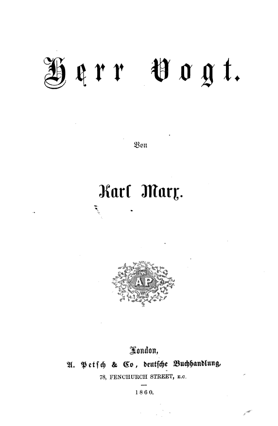 Tapa original del libro Herr Vogt de Karl Marx.